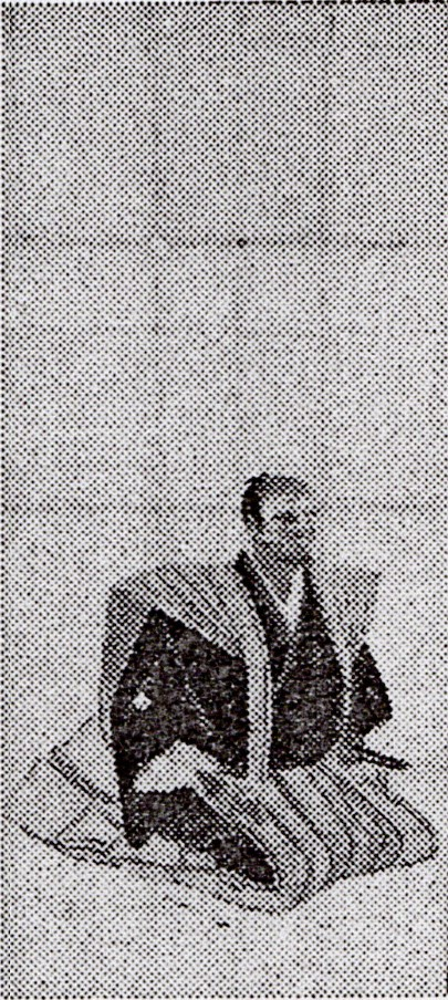 松平定永とされる肖像(モノクロ)。